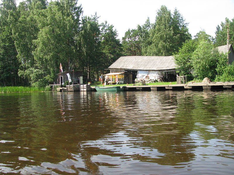 Pavadinimas: lv Lielirbe piestatne.jpg Data: 2011-07-10 15:18 Šaltinis: Biafra attēli Autorius: Biafrs